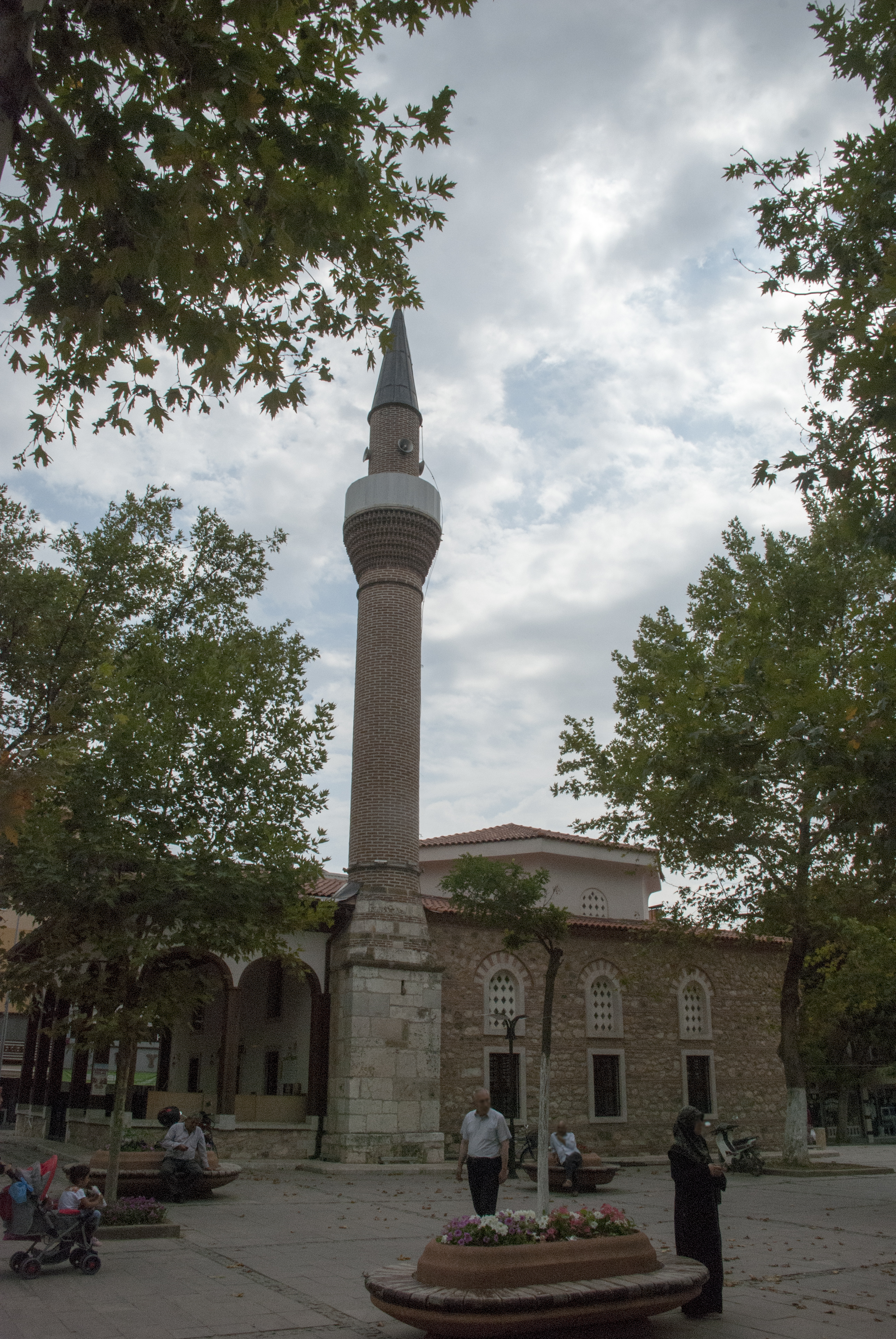 Yoyvoda (Çınarlı) Camii, Yenişehir, Bursa